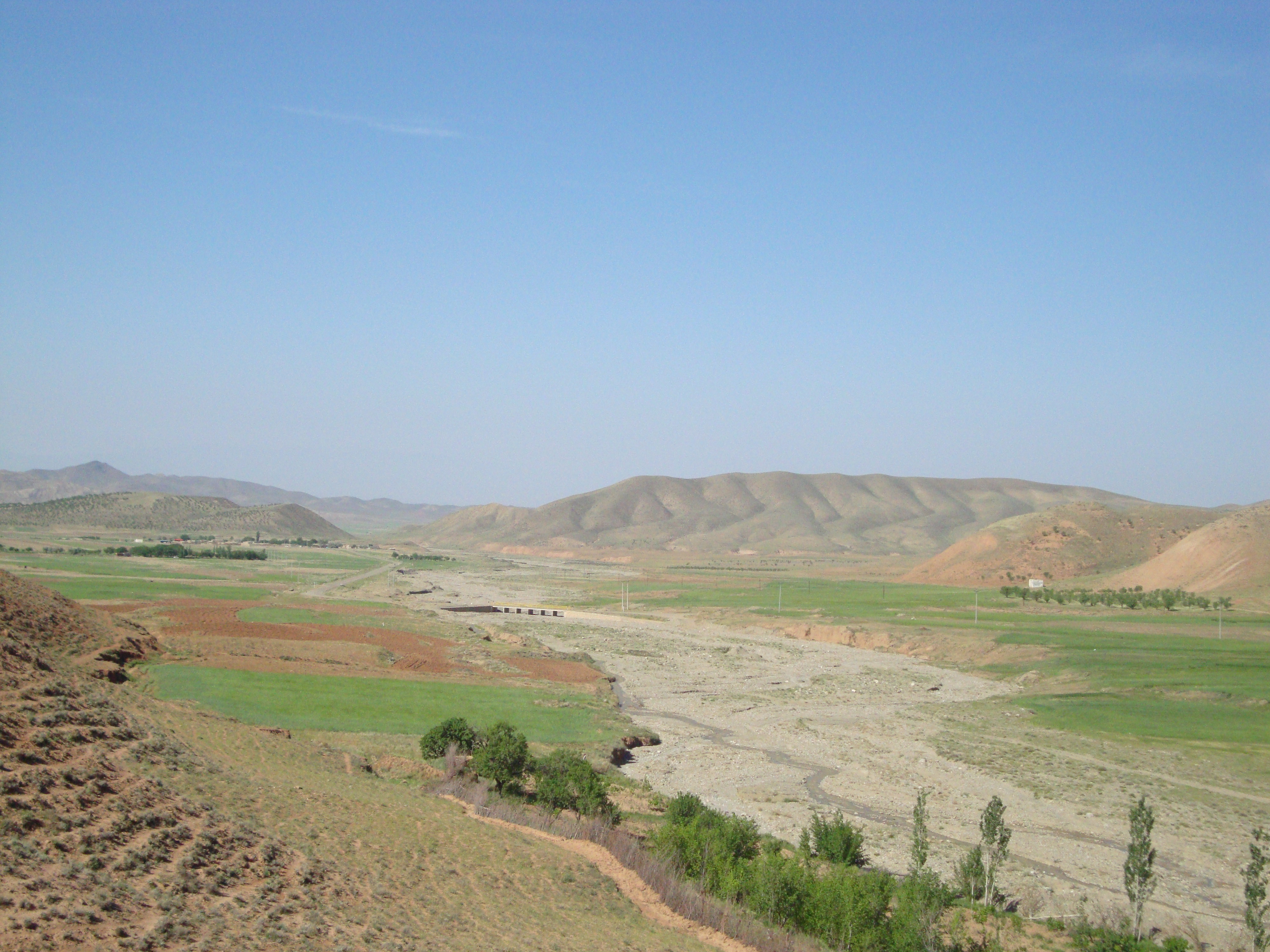 از شاخه های رودخانه کال ولایت می باشد از دامنه های جنوبی کوه یاتوبا ارتفاع 3102 متر از رشته کوه بینالود واقع در 29 کیلومتری خاور شهر اسفراین سرچشمه می گیرد. از شمال به جنوب جریان می یابد. سپس از خروج از دامنه های جنوبی بینالود وارد اراضی روستای جهان می گردد. اراضی این روستا و روستای چهارمست را مشروب نموده و در جنوب باختری روستای اخیر وارد رودخانه کال ولایت می شود. طول این رودخانه 24 کیلومتر بوده ودر روستای جهان محل مناسبی برای احداث سد بر روی آن وجود دارد رودخانه جهان دارای آب دائم بوده ولی جریان دائمی آن به مصرف روستاهای مسیر رسیده و فاضلاب ان وارد رود ولایت می شود.